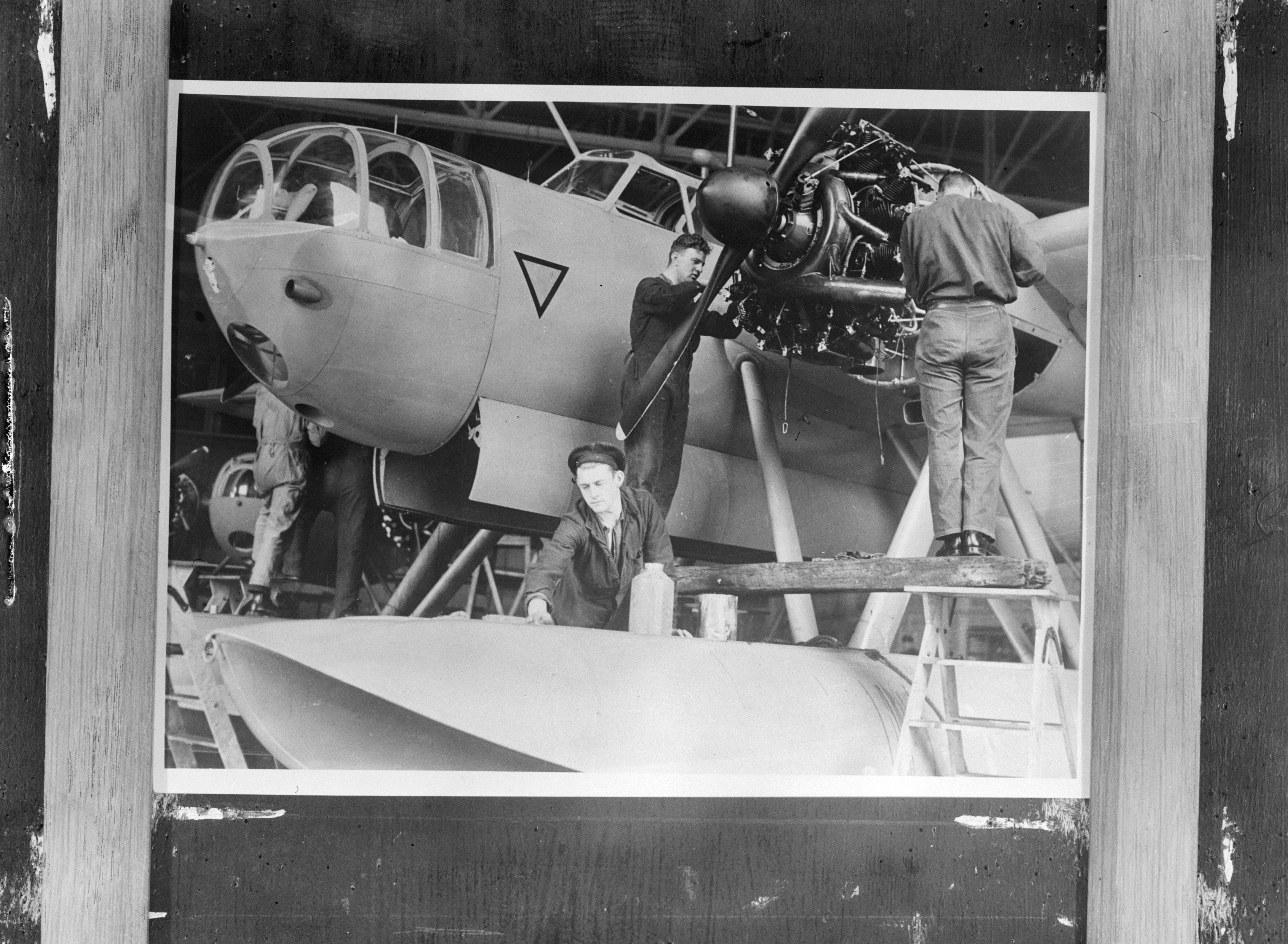 Collectie / Archief : Fotocollectie Anefo Reportage / Serie : [ onbekend ] Beschrijving : Marine Luchtvaartdienst in Engeland. Nederlandse mecaniciens onderhouden een Fokker watervliegtuig Datum : 1940 Locatie : Groot-Brittannië Trefwoorden : luchtmacht, marine, tweede wereldoorlog, vliegtuigen Persoonsnaam : Fokker Fotograaf : Air Ministry (Great-Britain) Auteursrechthebbende : Nationaal Archief Materiaalsoort : Negatief (zwart/wit) Nummer archiefinventaris : bekijk toegang 2.24.01.04 Bestanddeelnummer : 934-8600